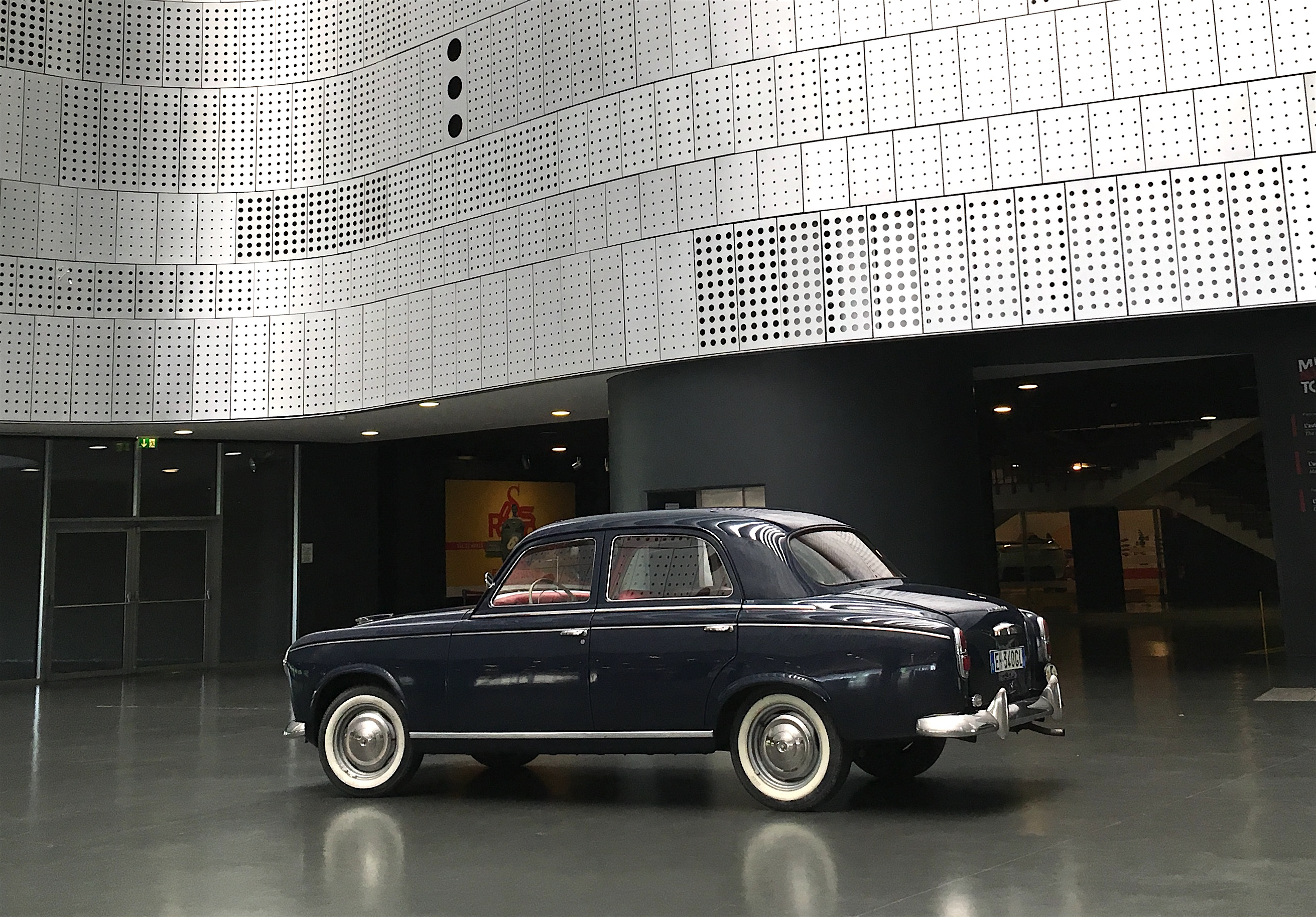 Una Peugeot 403 berlina del 1964, perfettamente conservata, nella "piazza" centrale del Museo Nazionale dell'Automobile di Torino, 2018.